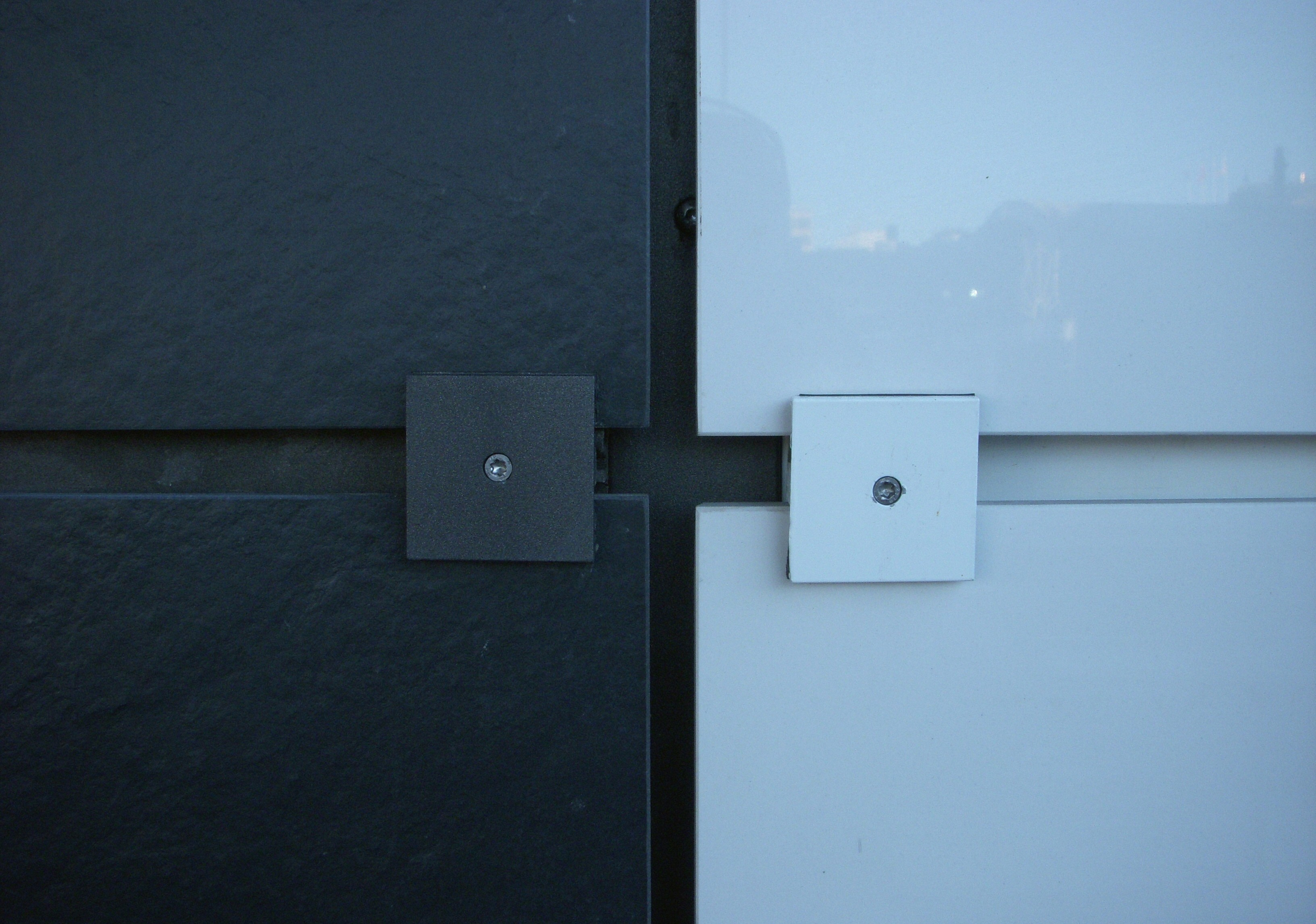 Waterfront Building, Stockholm, infästningsdetalj fasadplattorna